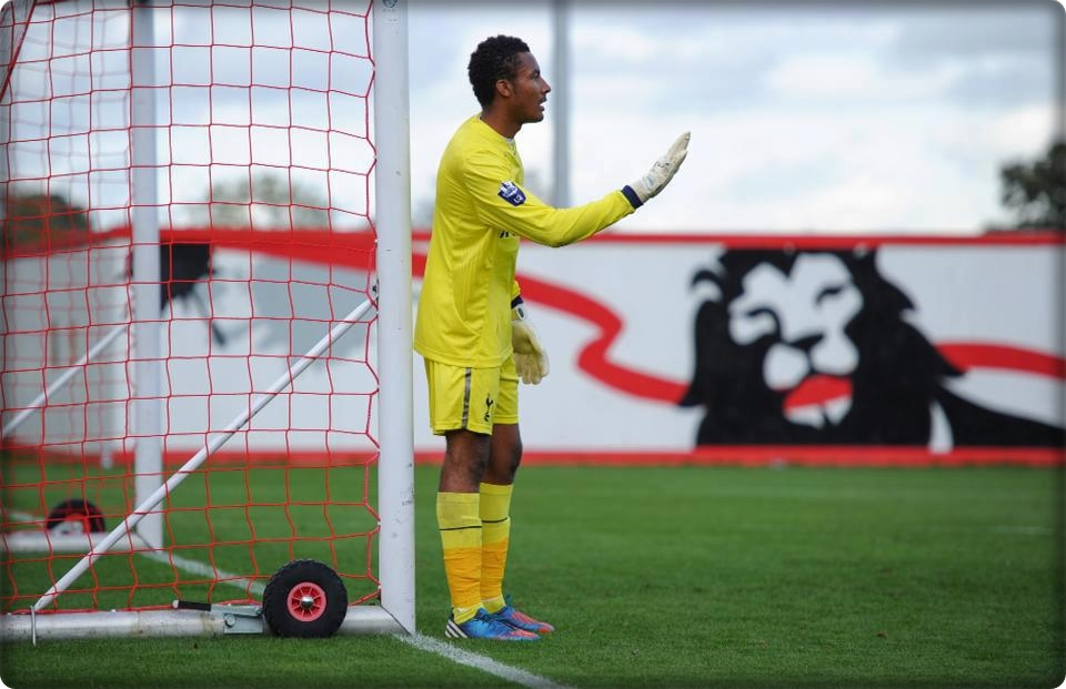 Lawrence Vigouroux atajando en Tottenham Hotspurs sub 21.